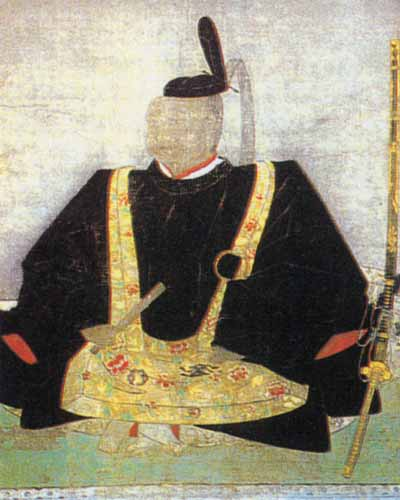 立花宗茂の晩年の肖像画。